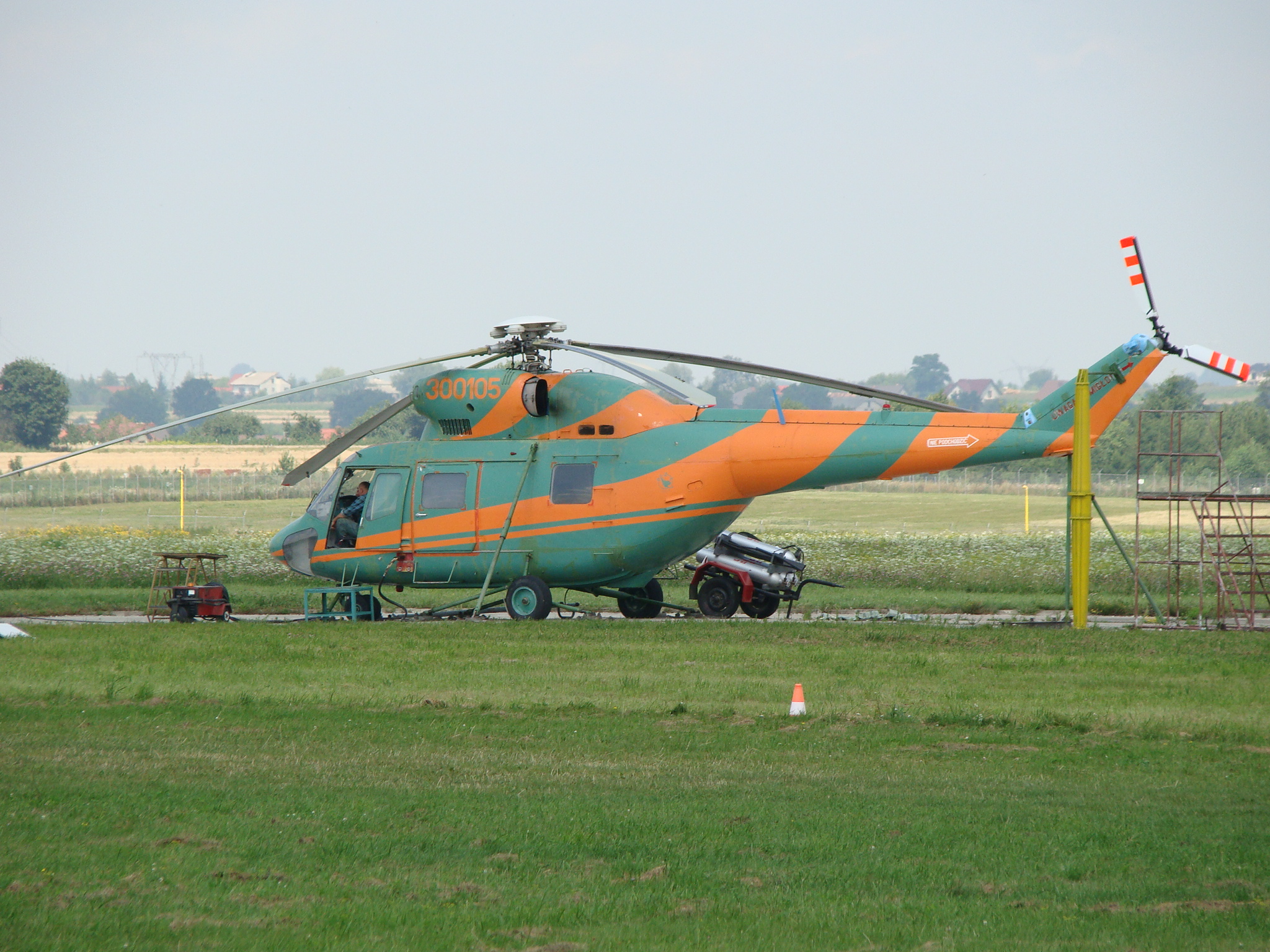 PZL Sokół na lotnisku trawiastym w Świdniku